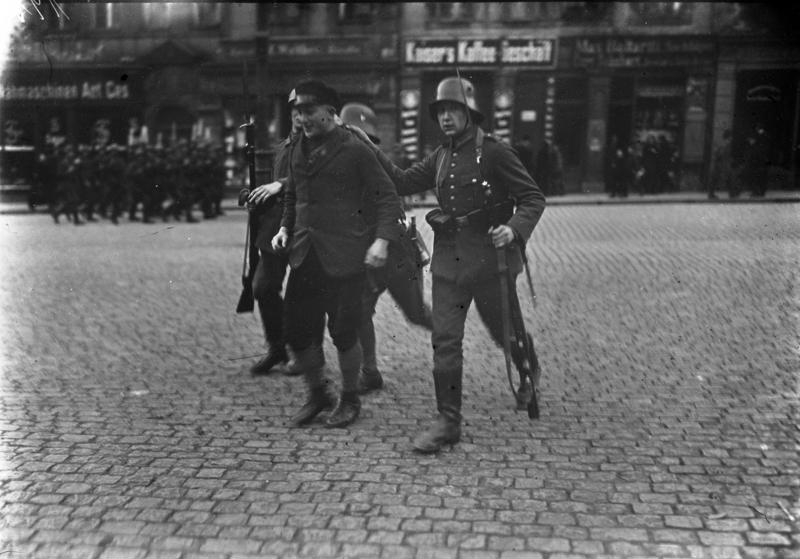 Vorgehen der Reichswehr gegen die kommunistischen Hundertschaften in Sachsen. Verhaftung eines kommunistischen Rädelsführers durch Reichswehr.